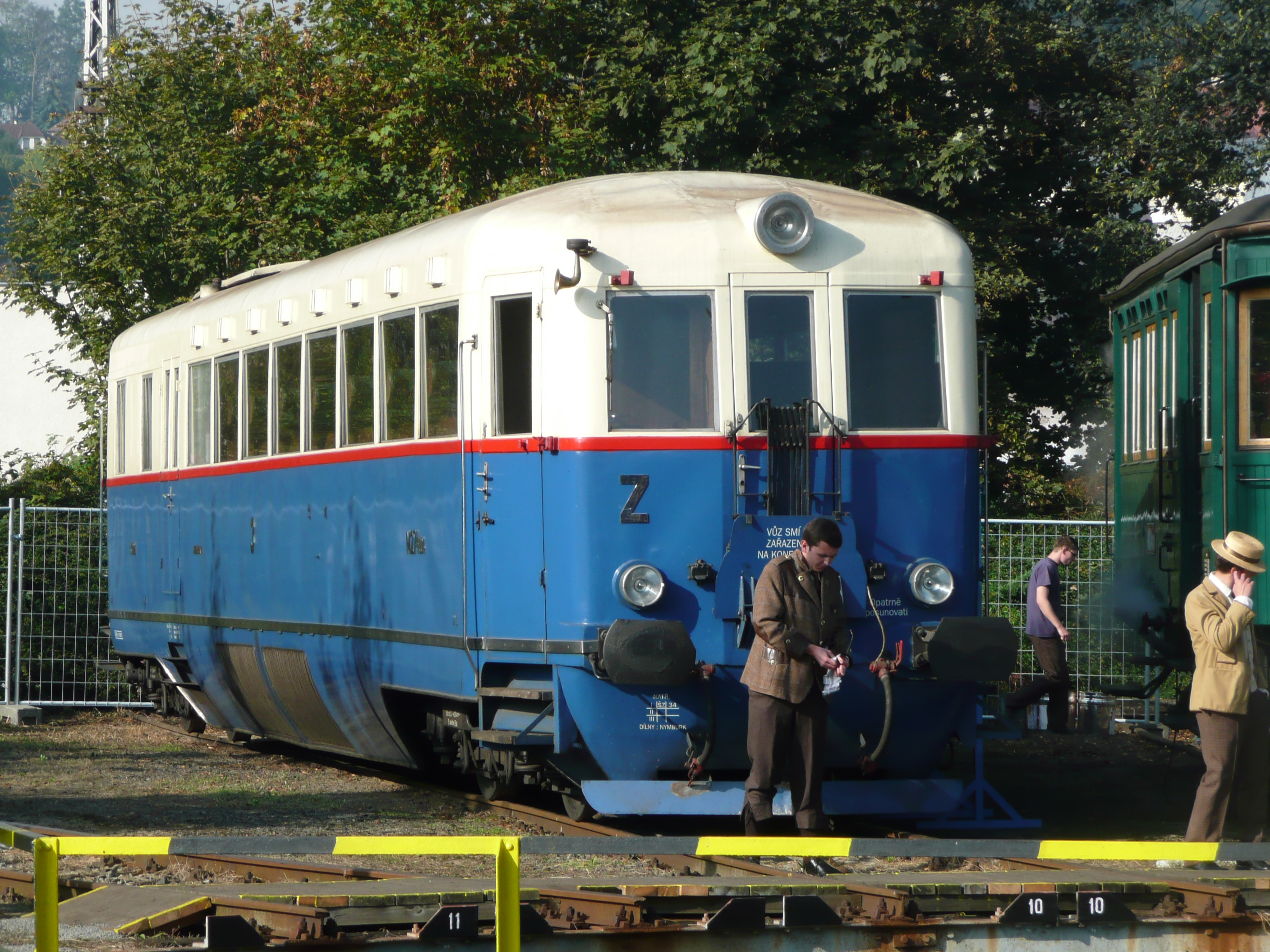 M 274.004 auf einer Fahrzeugausstellung in Decin